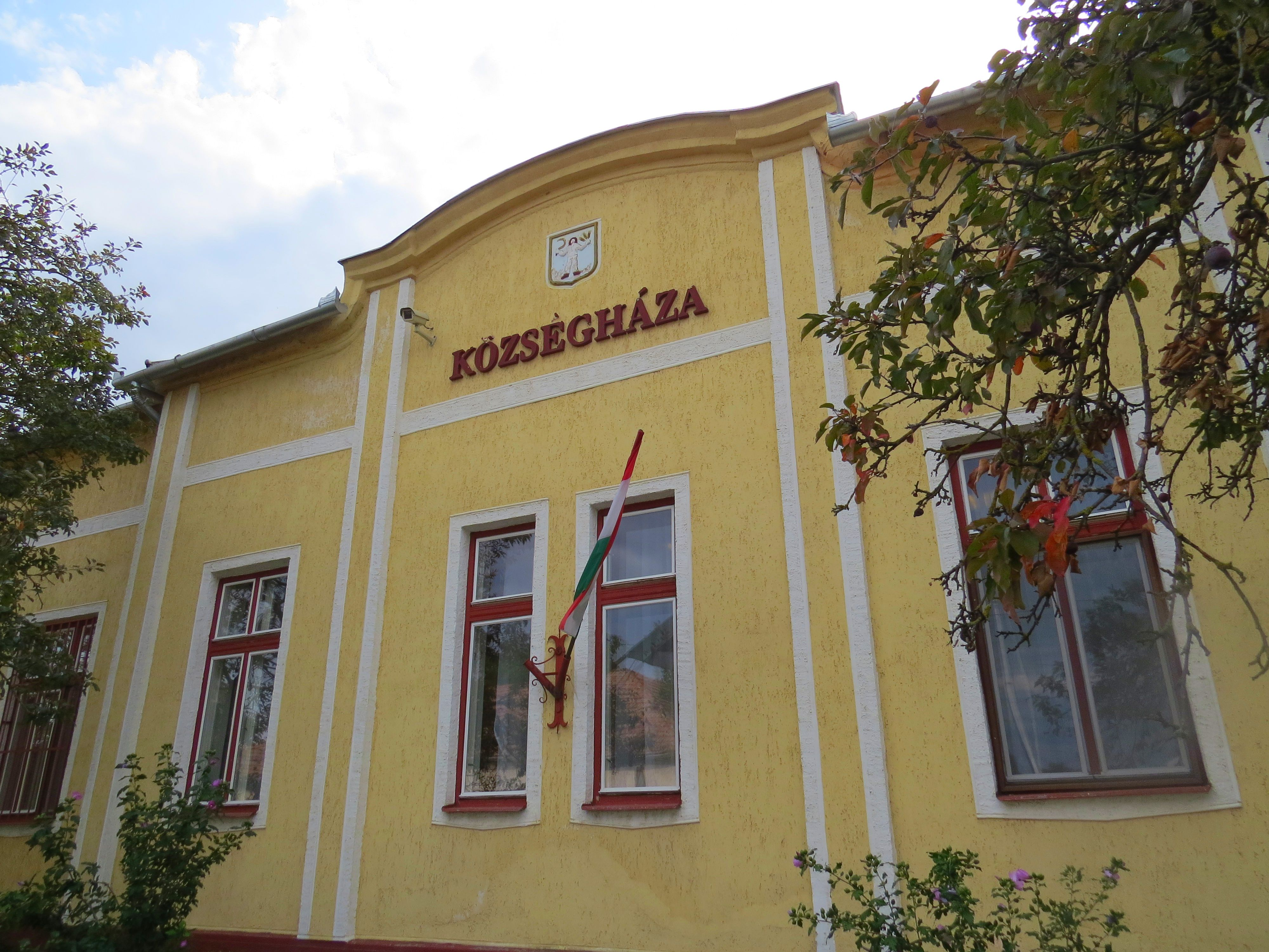 A Furtai községháza épülete 2017-ben. A Polgármesteri Hivatal számára szolgáló épület, 1906-ban épült.